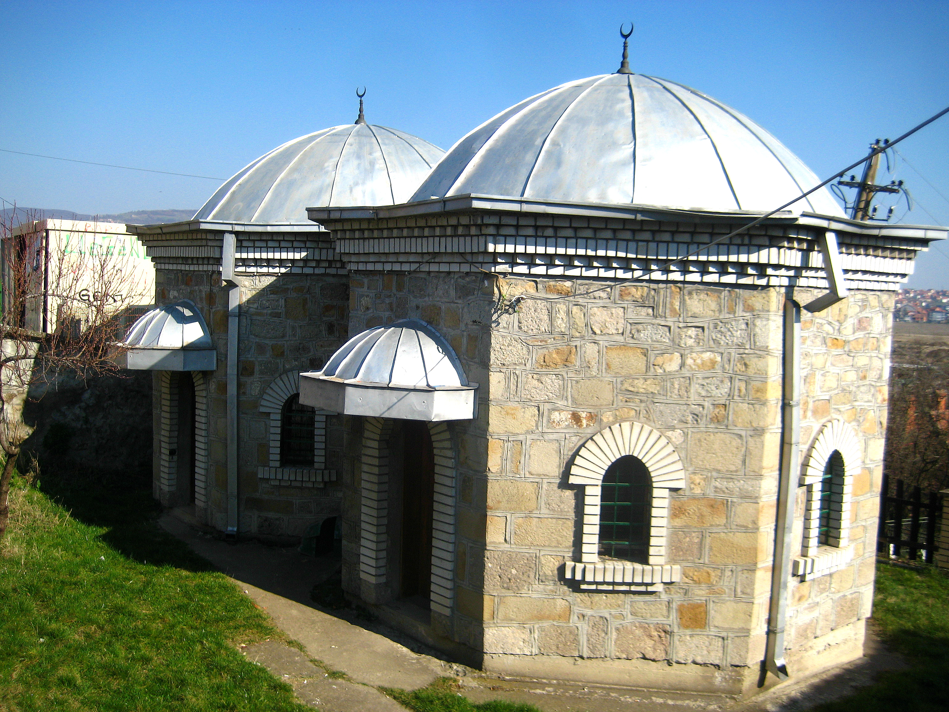 Teqja e Jonuz Efendisë